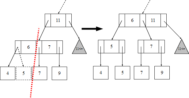 Beszúrás 2-3 fába - 3-csúcs eset